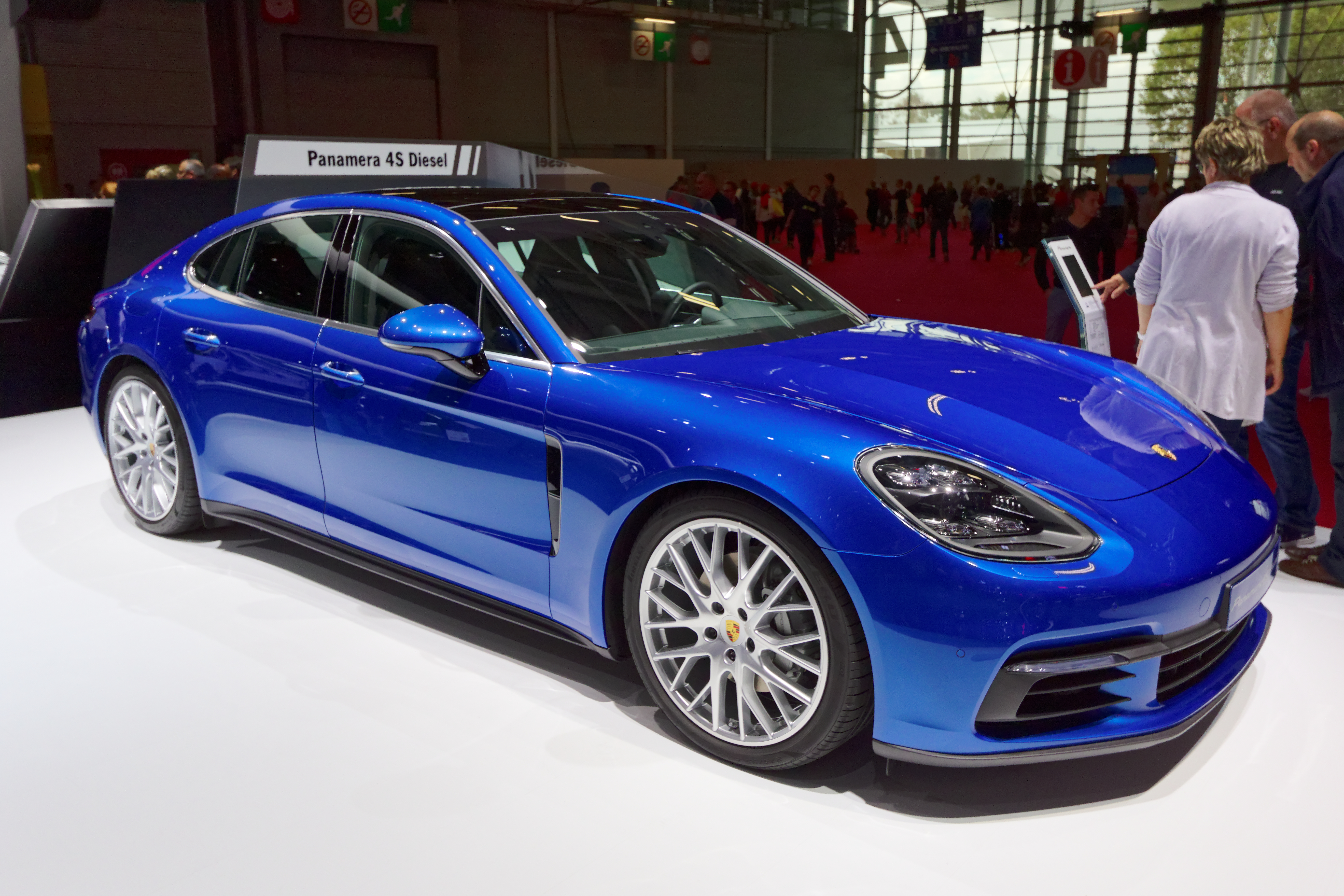 Une Porsche Panamera 4S diesel présentée lors du mondial de l'automobile de Paris 2016.